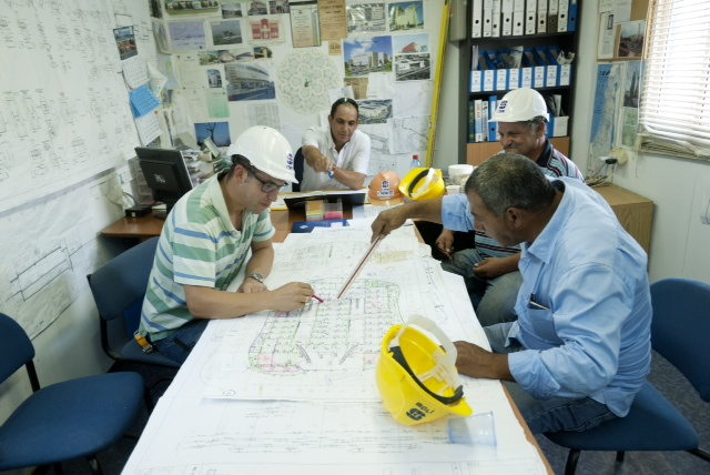 מהנדס ביצוע